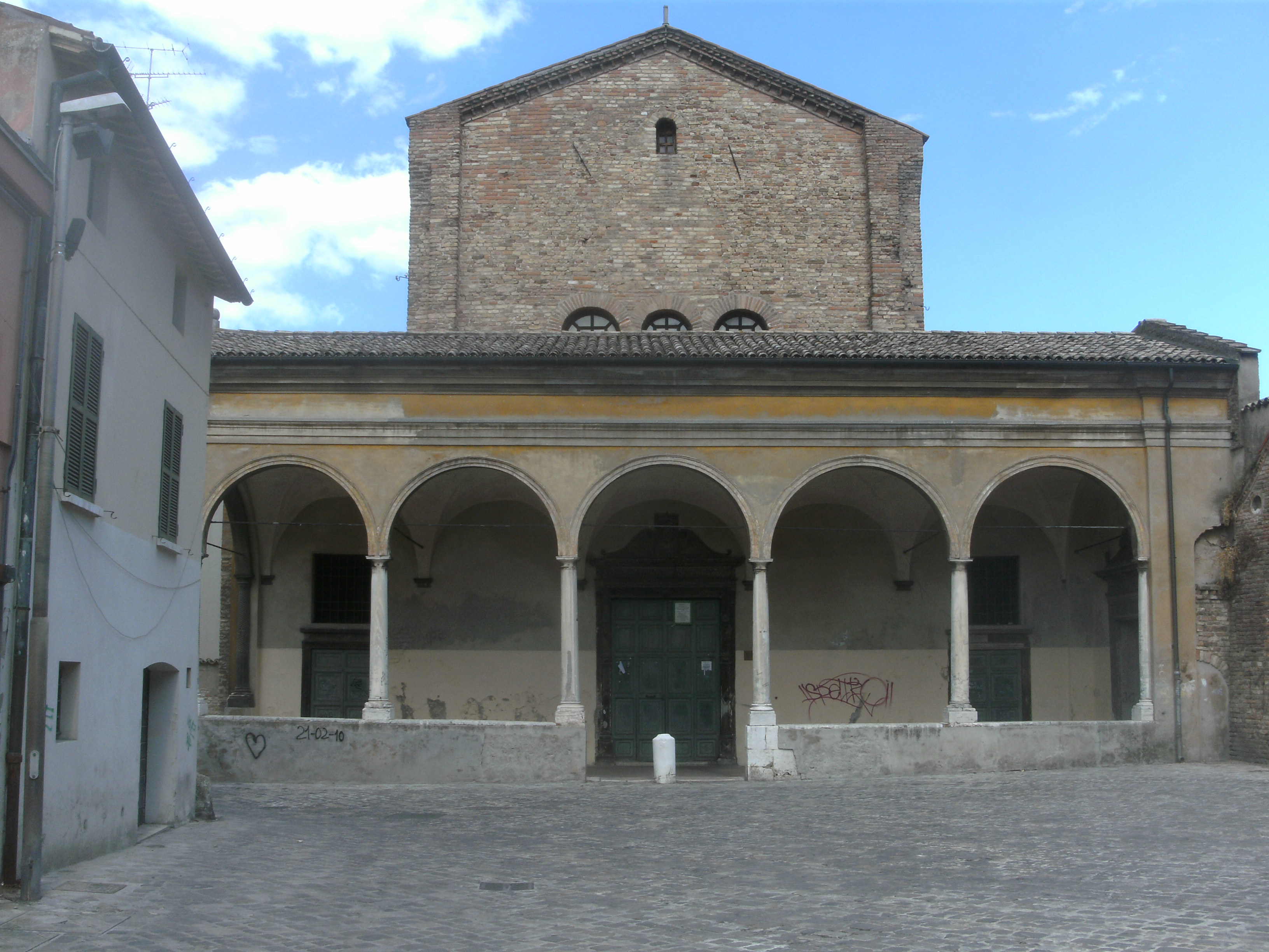 Ravenna, Kirche Spirito Santo (Heiliggeistkirche)